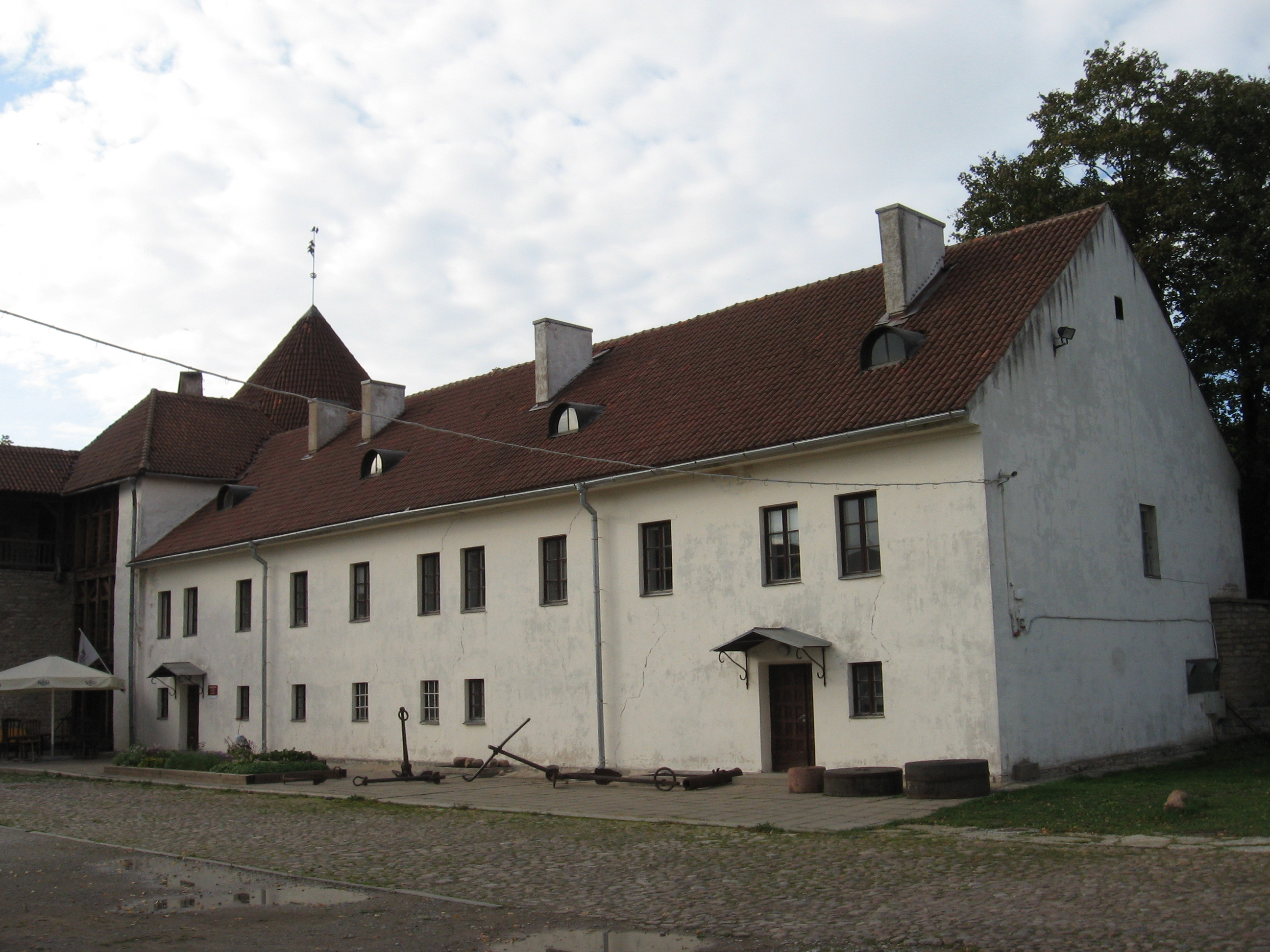 Narva Hermanni linnus. Õue. Vaade idast.